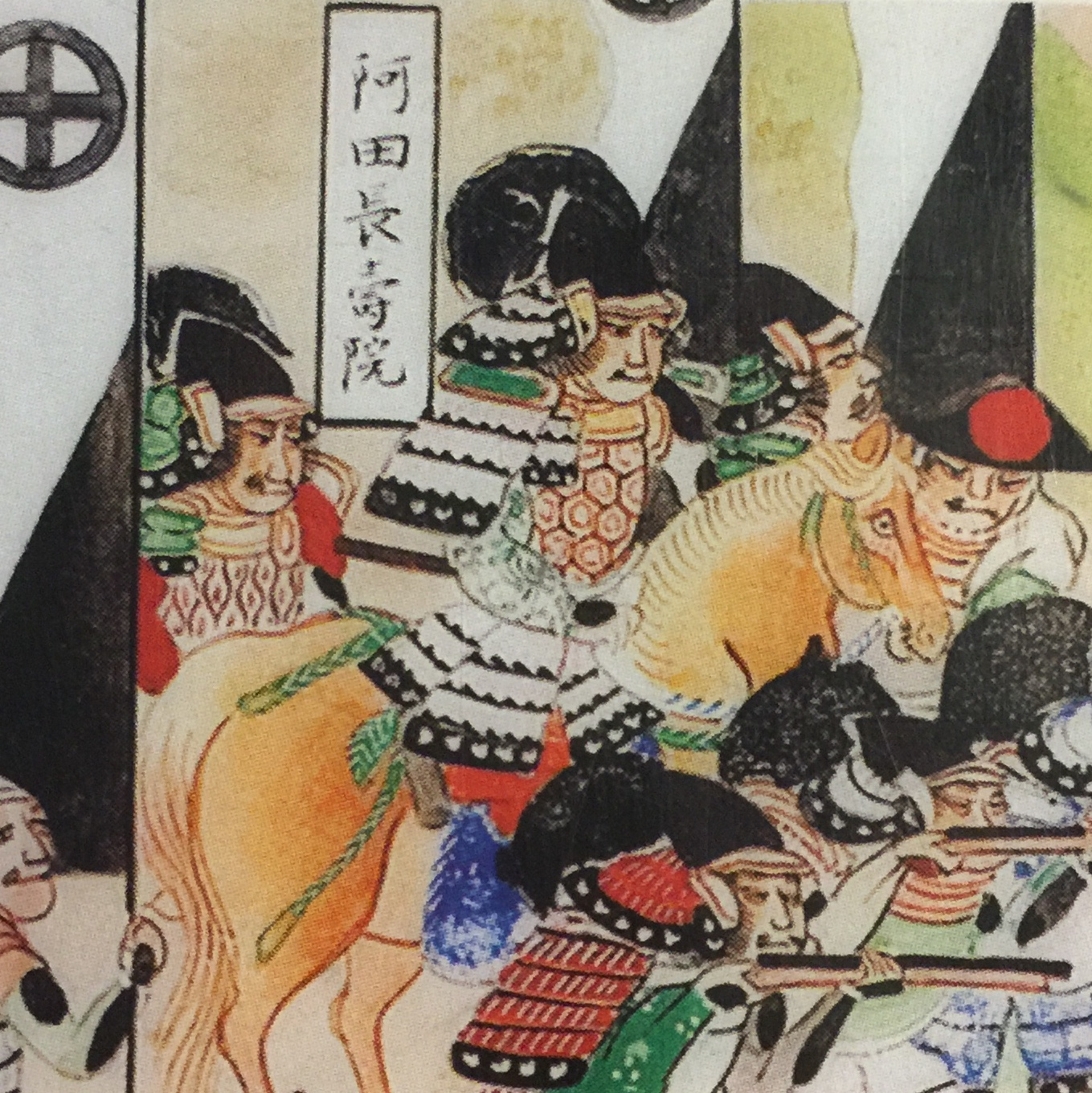 関ヶ原合戦図屏風（関ケ原町歴史民俗資料館本）に描かれた、島津家家臣の阿多長寿院（盛淳）。